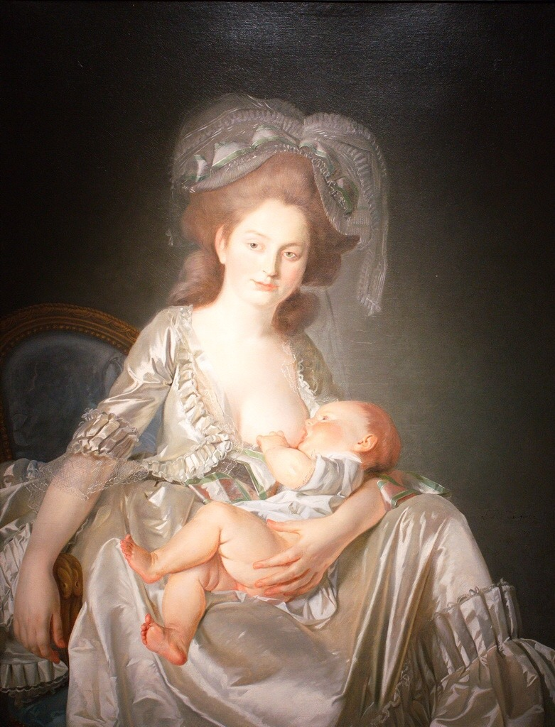 Louis-Roland Trinquesse (um 1745–1799): Stillende junge Frau. Öl auf Leinwand, 115 x 88 cm. Privatsammlung.